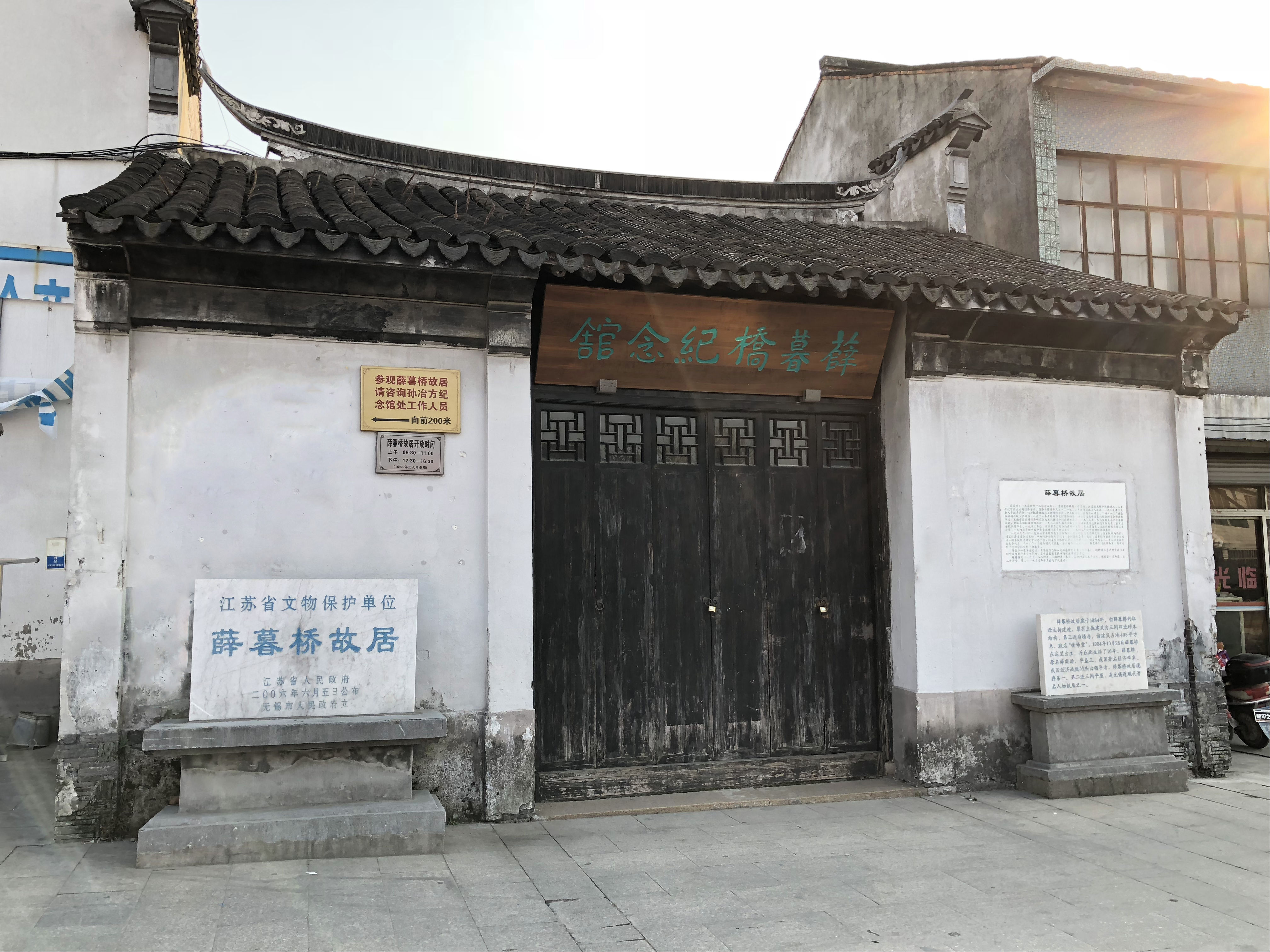 薛暮桥纪念馆